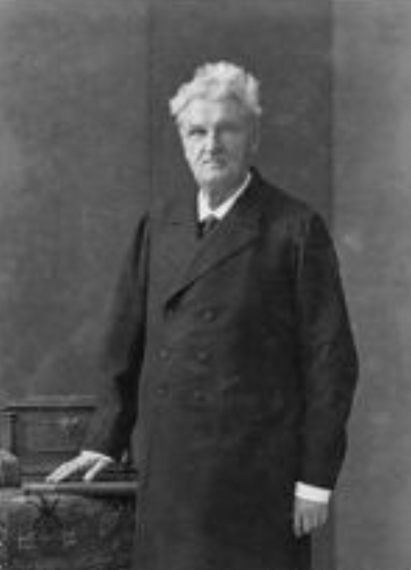 Wilhelm Nokk (* 1832; † 1903), deutscher Jurist und Politiker